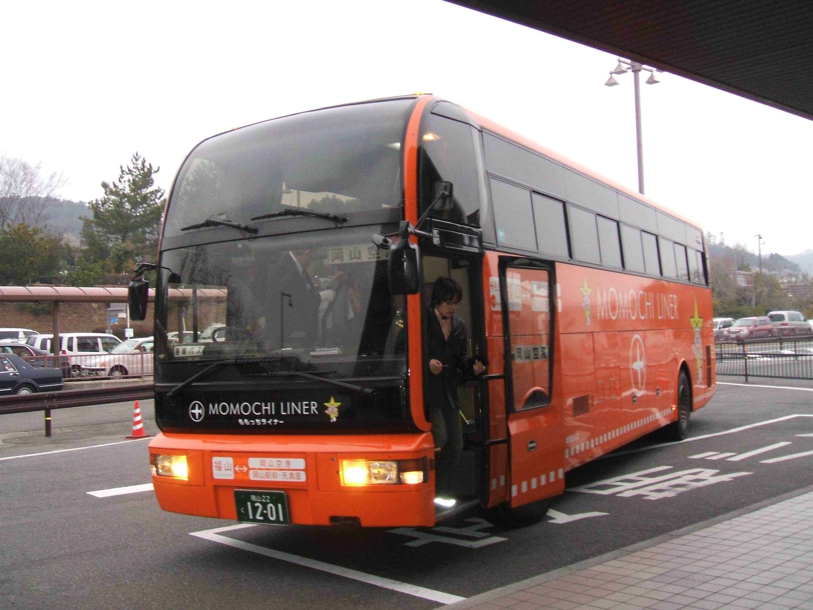 MOMOCCHI LINER(Fukuyama-Okayama airport bus)2007-03-24 ももっちライナー塗装の高速バス（中国バス）投稿者が撮影